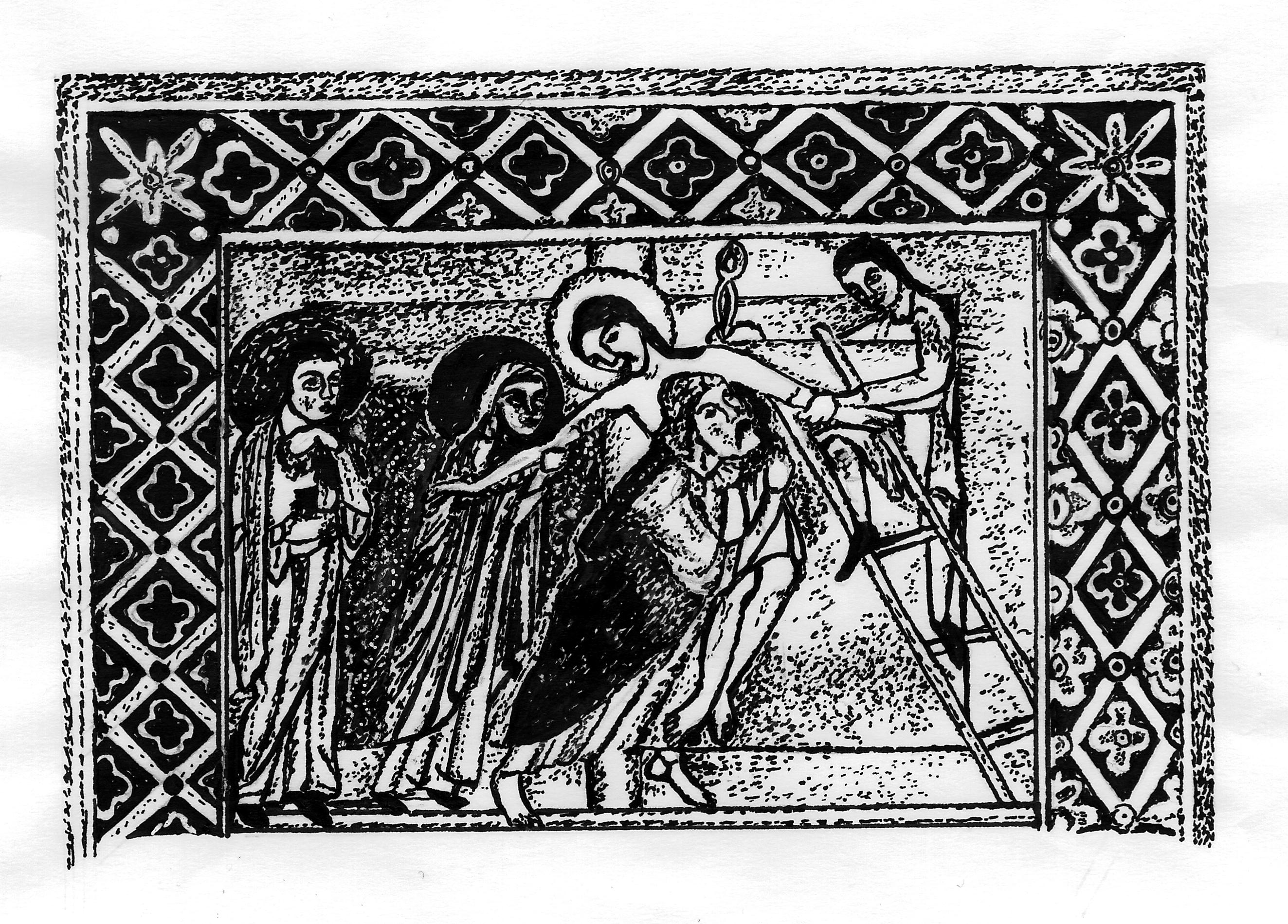 Nachzeichnung einer Buchmalerei der Kreuzabnahme von Roger von Helmarshausen. Um 1160.